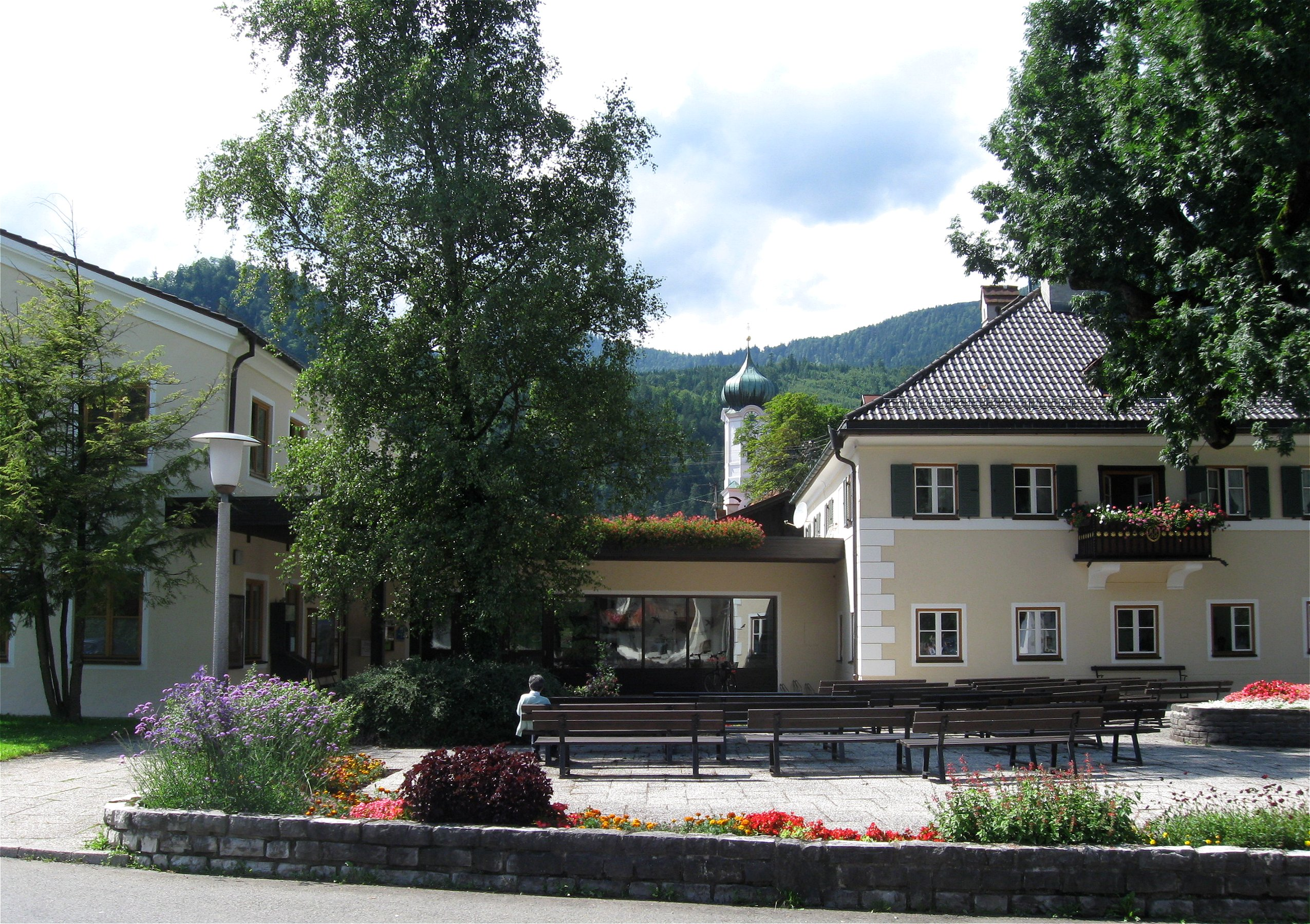 Am Gern 1; Ehem. Wohnhaus, jetzt Rathaus; Ehem. Wohnhaus des Großkaufmanns Martin Kirchmayr (1760-1841); zweigeschossiger biedermeierlicher Walmdachbau mit Eisenbalkon und Putzgliederung, bez. 1836; zweiflügelige, geschnitzte Haustür